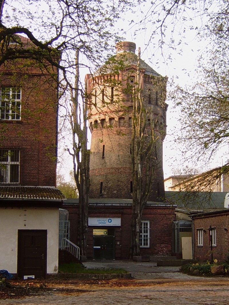 Berlin-Spandau, Kleine Eiswerderstraße 14, Erweiterung der Königlichen Pulverfabrik Spandau mit Wasserturm, Verwaltungstrakt; später Studiogelände der CCC-Film von Artur Brauner